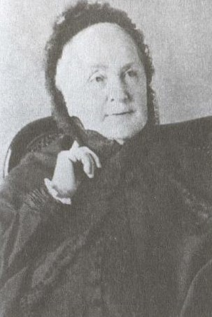 Мария Ивановна Игнатьева, ур. Мальцова